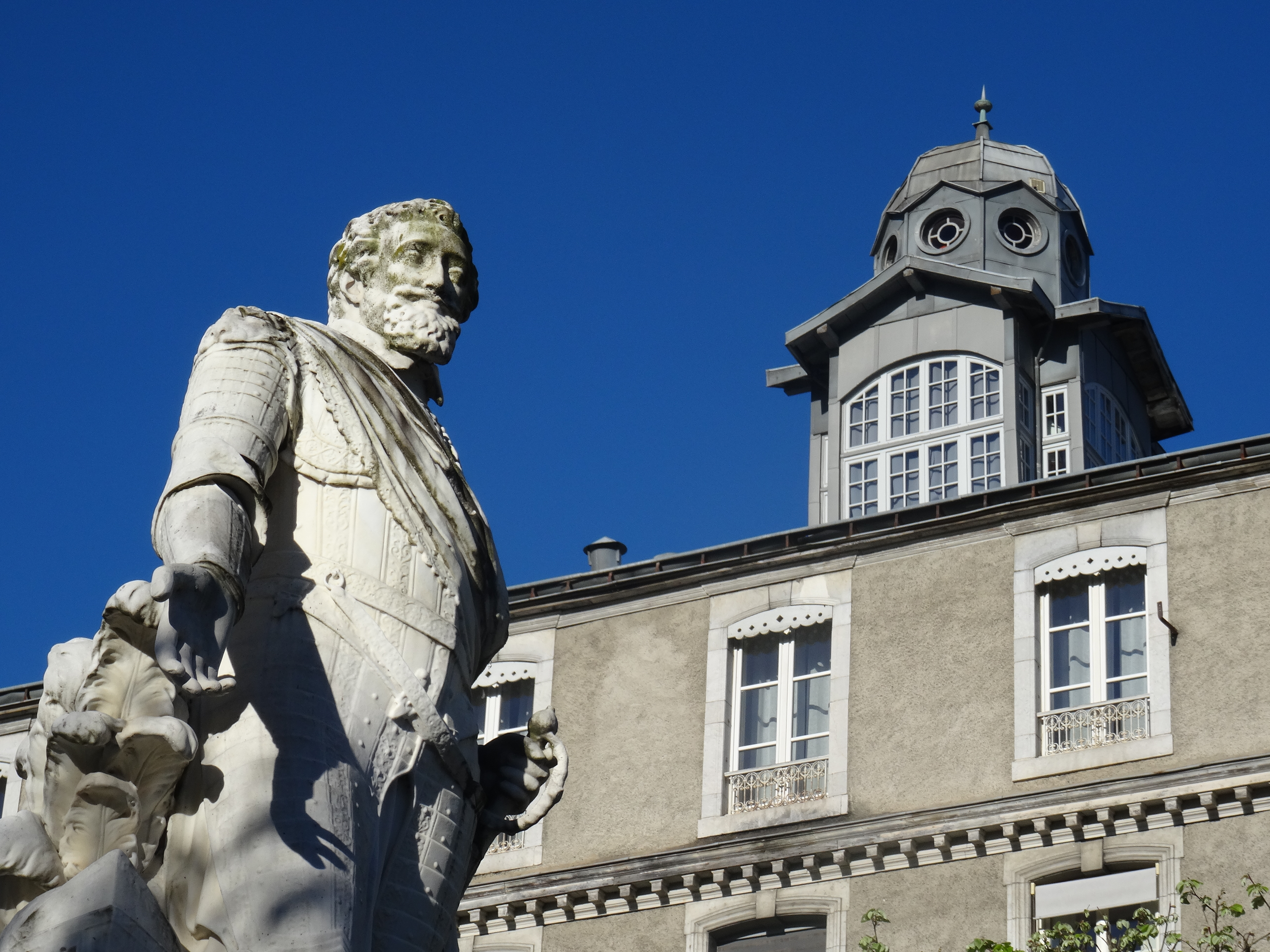 Statue d'Henri IV, place Royale à Pau